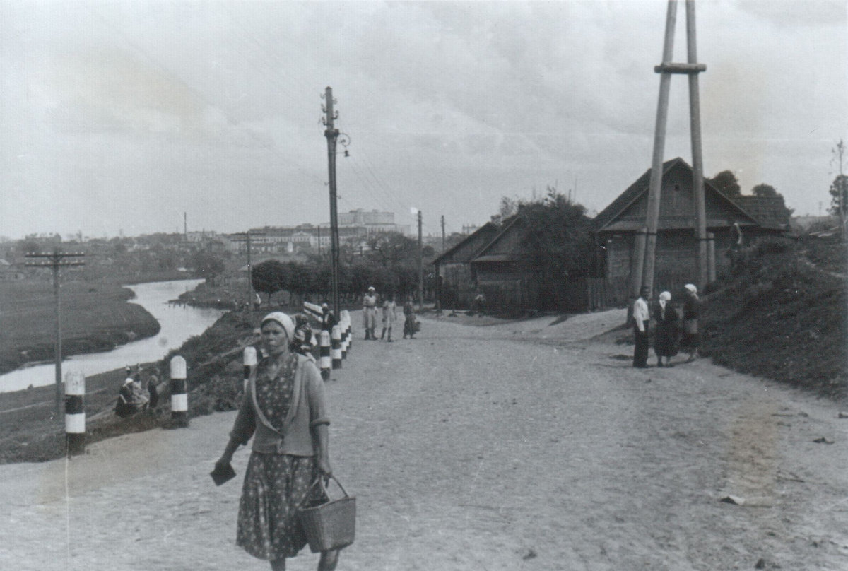 Беларуская (тарашкевіца): Менск (Miensk), вуліца Людамонцкая (vulica Ludamonckaja)